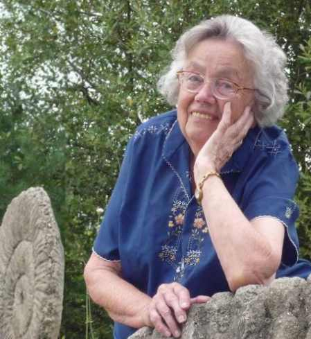 Die Technik-Ästhetin Elizabeth B. Snyder, geboren 1923 in Breslau, bei einem Symposion im Garten des ökologisch-botanischen Instituts der Universität Bayreuth.